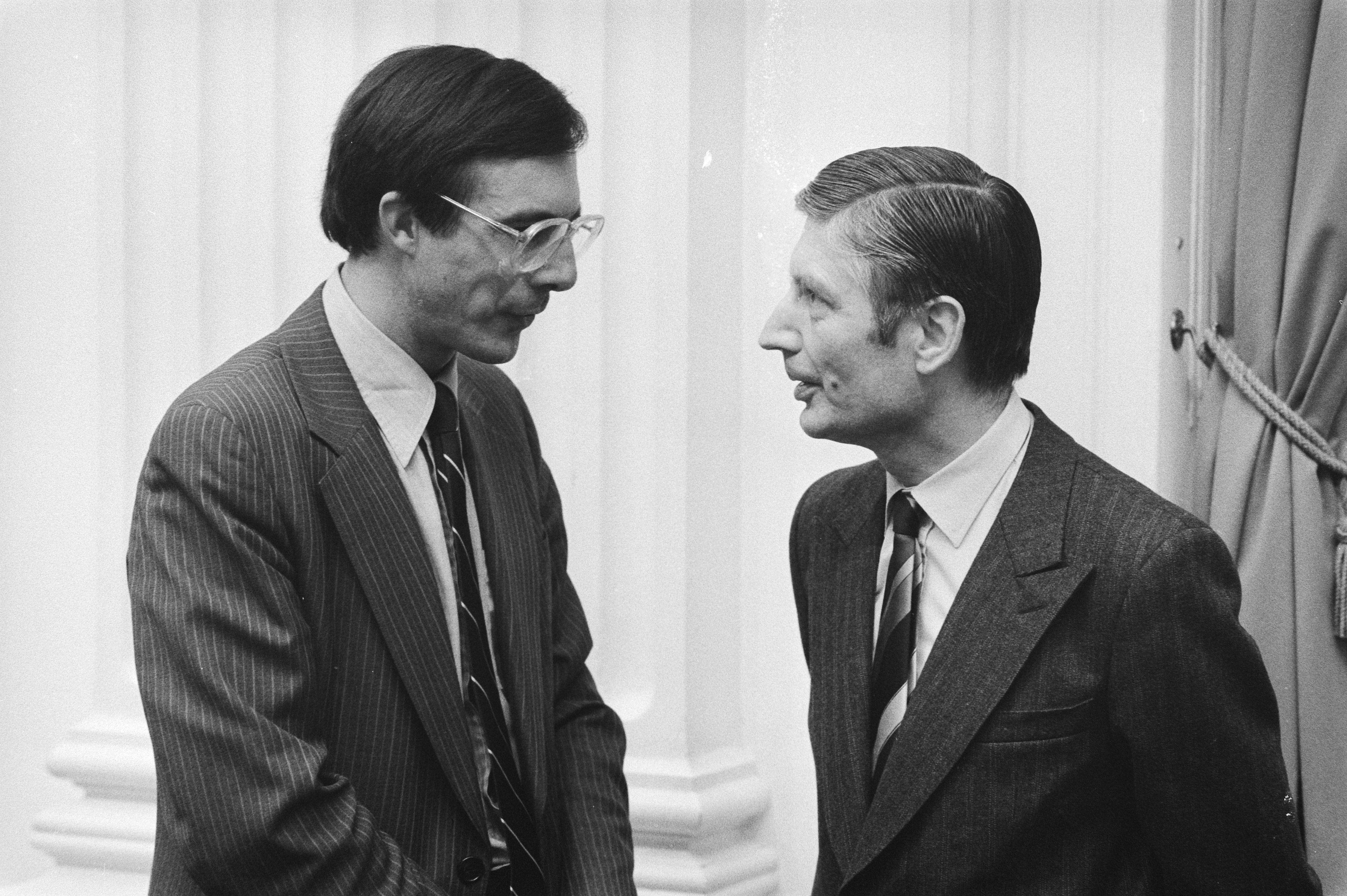 Collectie / Archief : Fotocollectie Anefo Reportage / Serie : Tweede Kamer is bijeen over de levering van duikboten aan Taiwan Beschrijving : V.l.n.r. Laurens Jan Brinkhorst in gesprek met Dries van Agt in de tweede kamer Datum : 3 februari 1981 Locatie : Binnenhof, Den Haag, Zuid-Holland Trefwoorden : ministers-presidenten, parlementariërs, parlementen Persoonsnaam : Agt, Dries van, Brinkhorst, Laurens Jan Fotograaf : Antonisse, Marcel / Anefo, [onbekend] Auteursrechthebbende : Nationaal Archief Materiaalsoort : Negatief (zwart/wit) Nummer archiefinventaris : bekijk toegang 2.24.01.05 Bestanddeelnummer : 931-3002